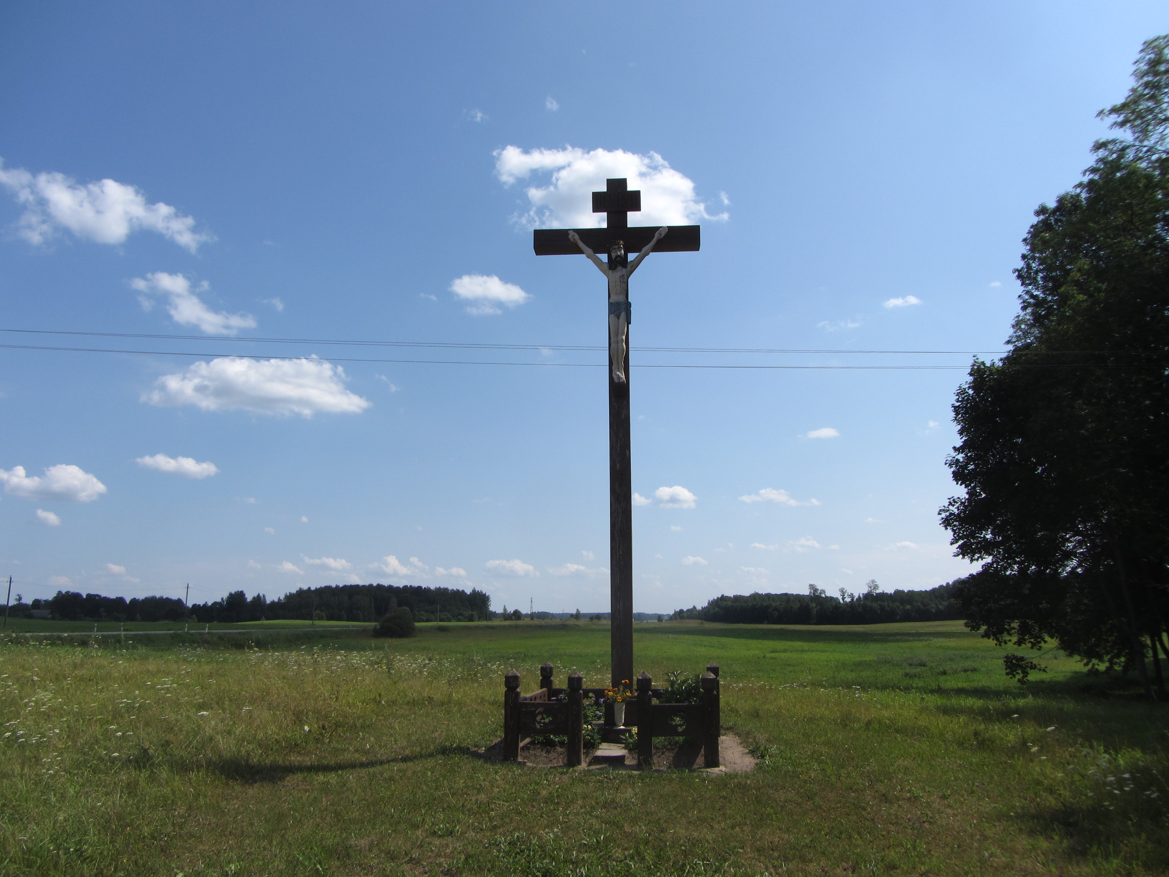 Imbrado sen., Lithuania